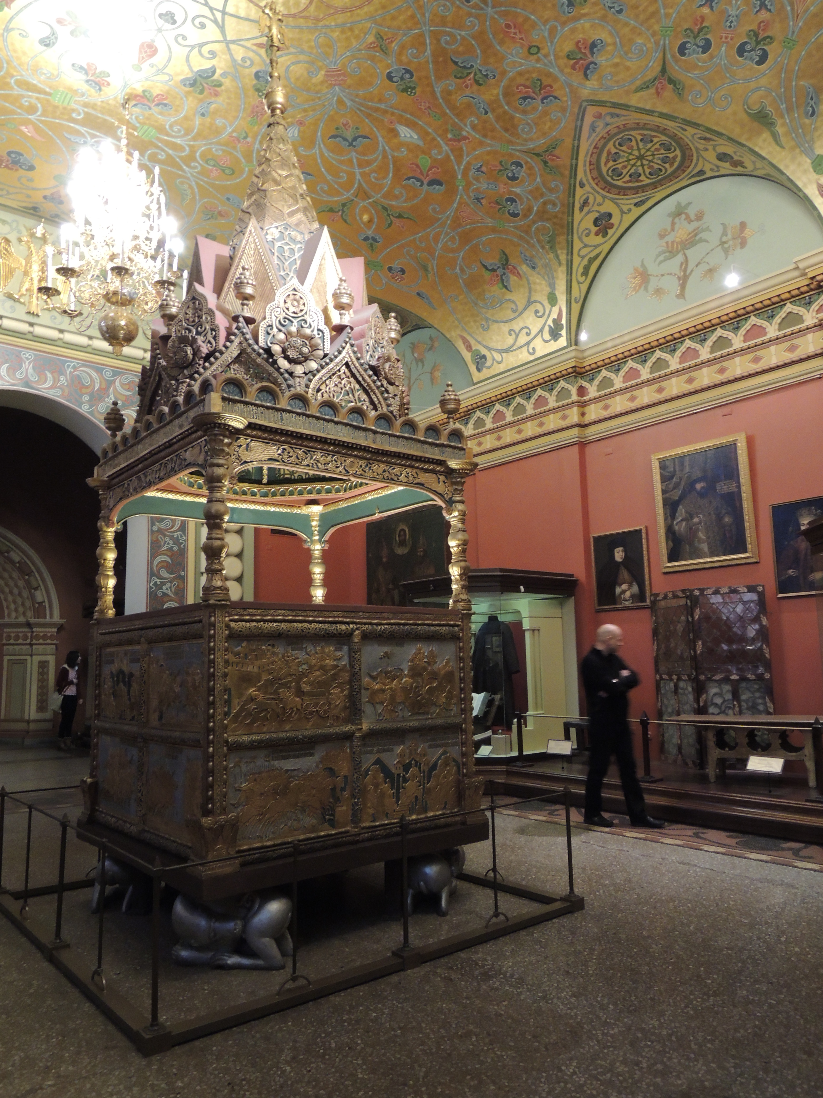 Мономахов трон. ГИМ